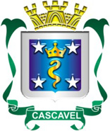 Brasão do município de Cascavel, estabelecido pela Lei nº 243, de 9 de outubro de 1963.